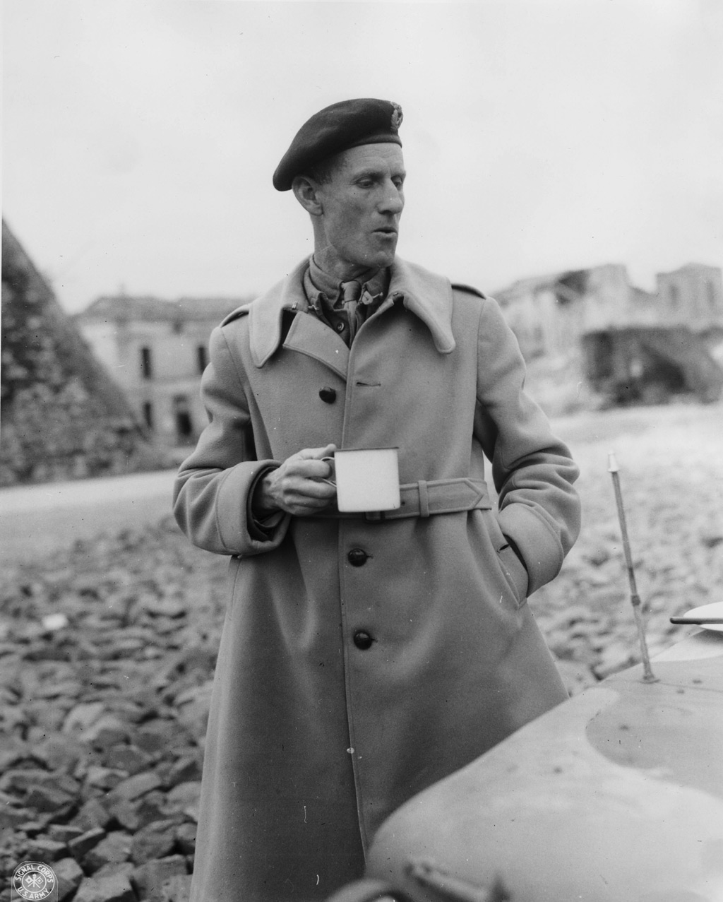 Il generale britannico Richard L. McCreery a Salerno durante l'operazione Avalanche